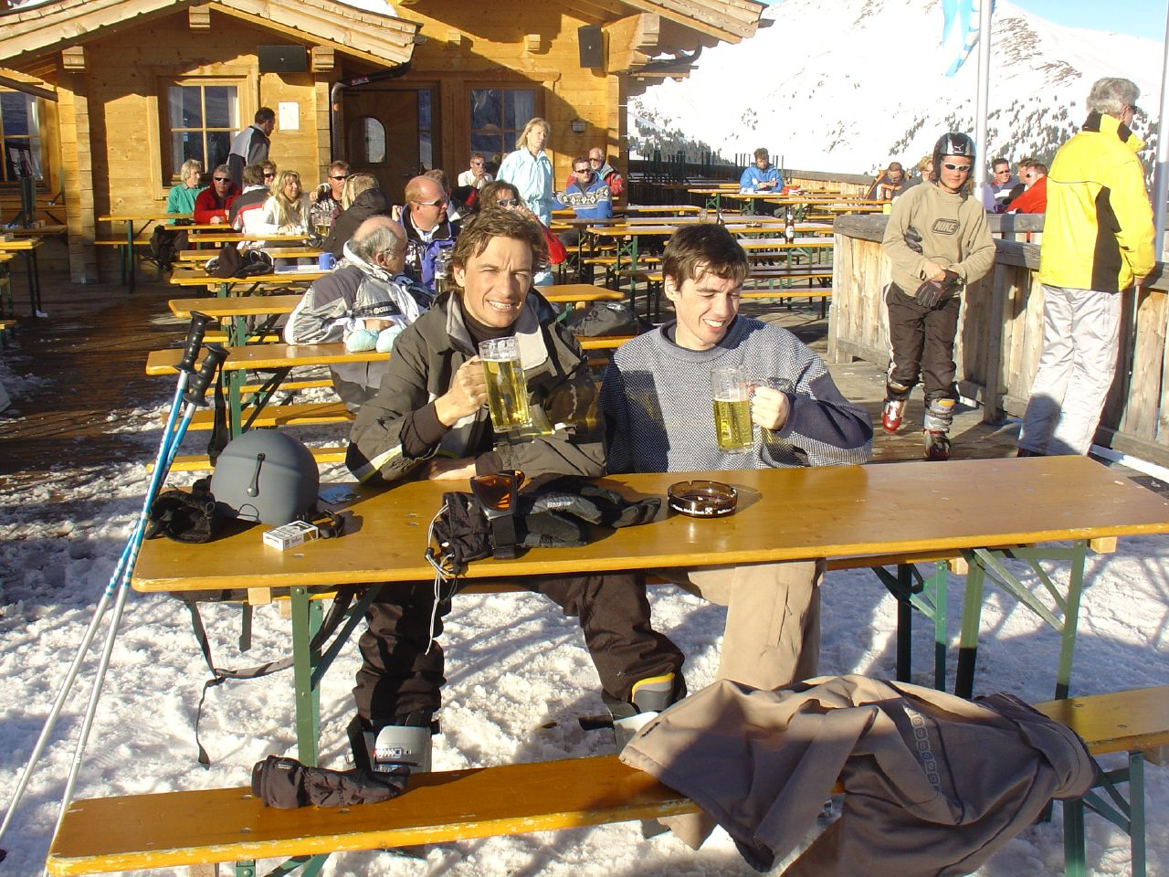 Après-ski in Gerlos, Tyrol, Austria